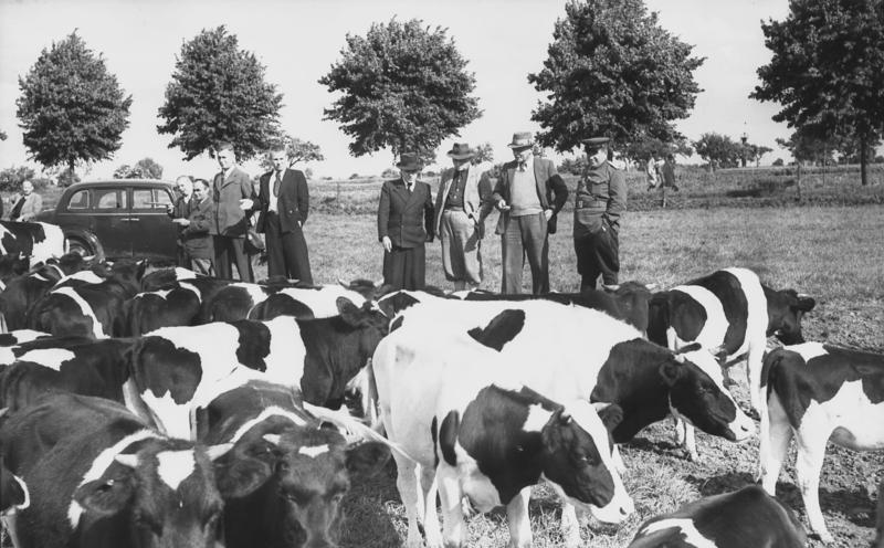 ADN-ZB-Heilig Übergabe des im sowjetischer Verwaltung befindlichen Tierzuchtgutes Großbeeren im Kreis Teltow durch die SMAD am 27.6.1949 in die Hände der deutschen Verwaltungsorgane der sowjetischen Besatzungszone. UBz: die sowjetische und die deutsche Kommission bei der Besichtigung der Jungviehherden auf der Weide. 3499-49